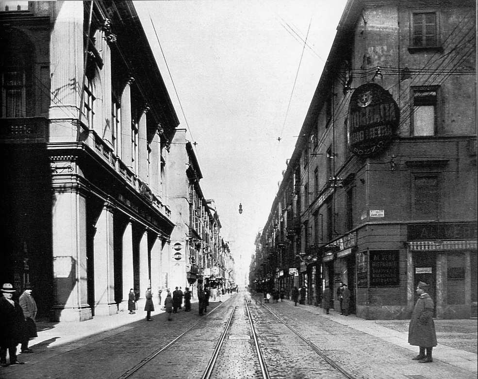 Via Roma angolo via Andrea Doria (oggi via Gramsci) nel 1926 Autore sconosciuto Fonte